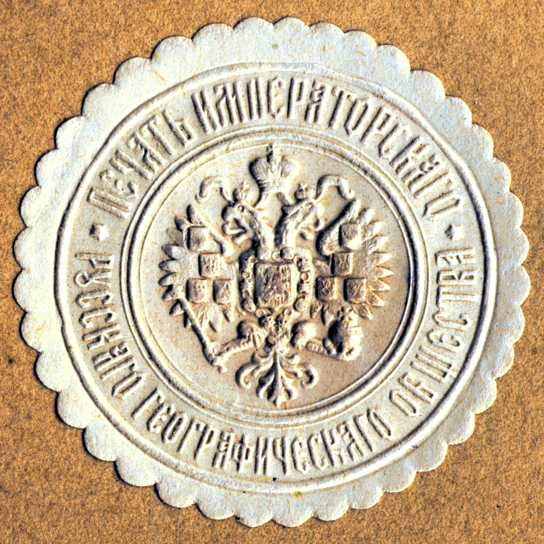 Печать - Императорское Русское Географическое Общество, 1915